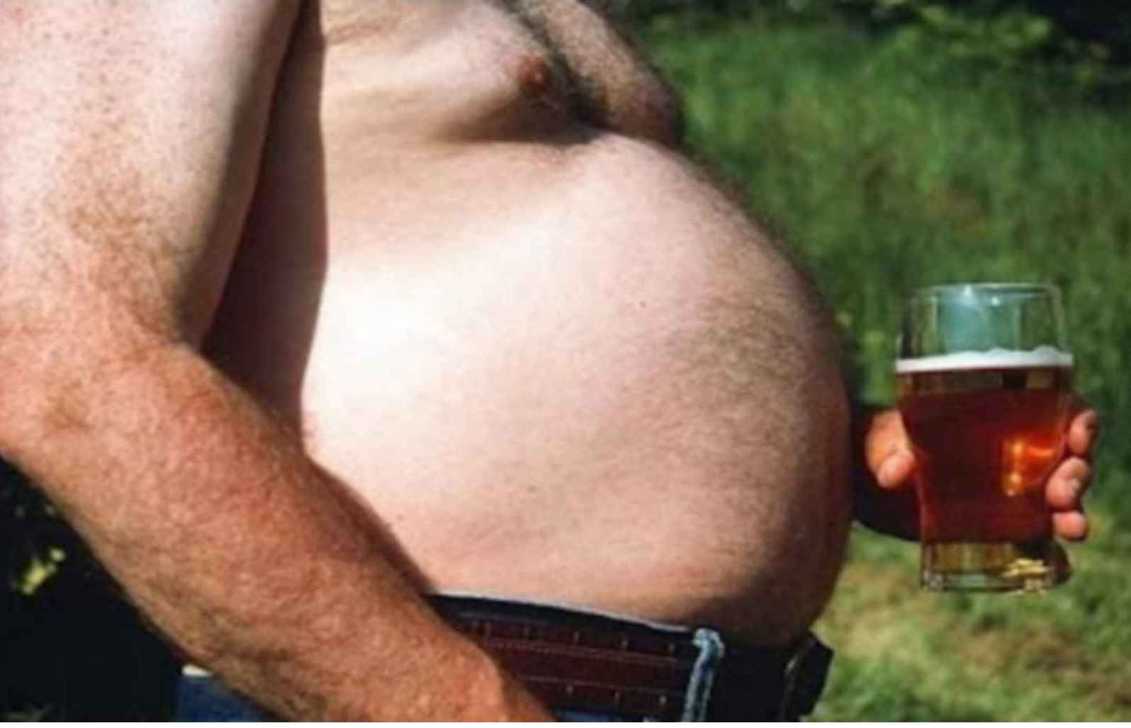 Bierbauch - Brauereigeschwür